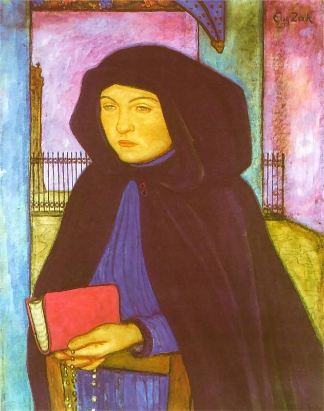 reprodukcja obrazu Eugeniusza Zaka